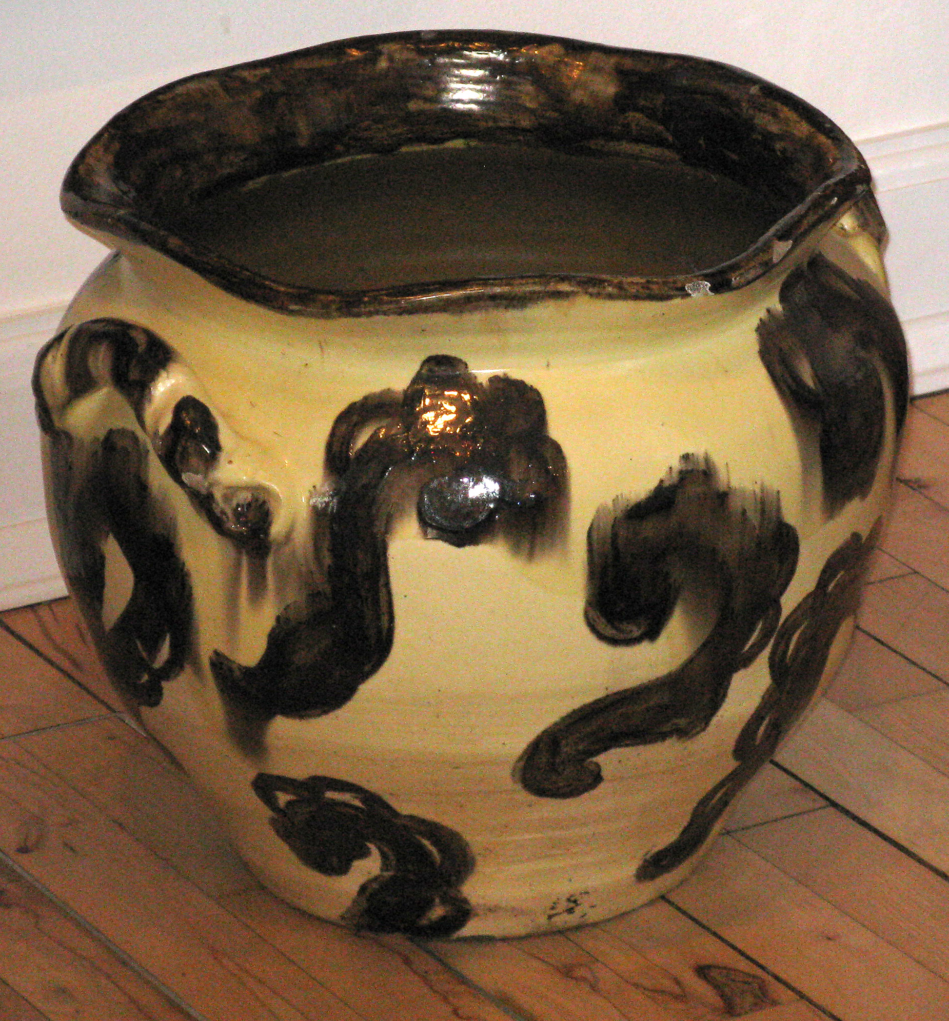 Krukke af Thorvald Bindesbøll på Koldinghus